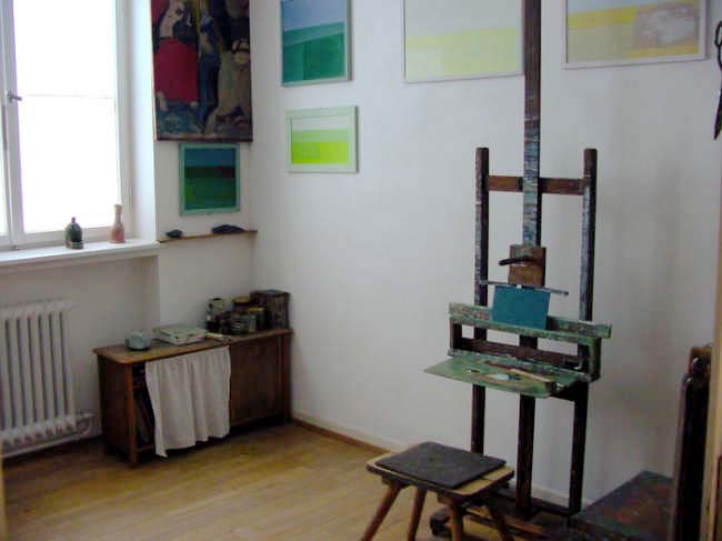 Atelier von Jakob Braeckle - Im Braith Mali Museum in Biberach/Riß